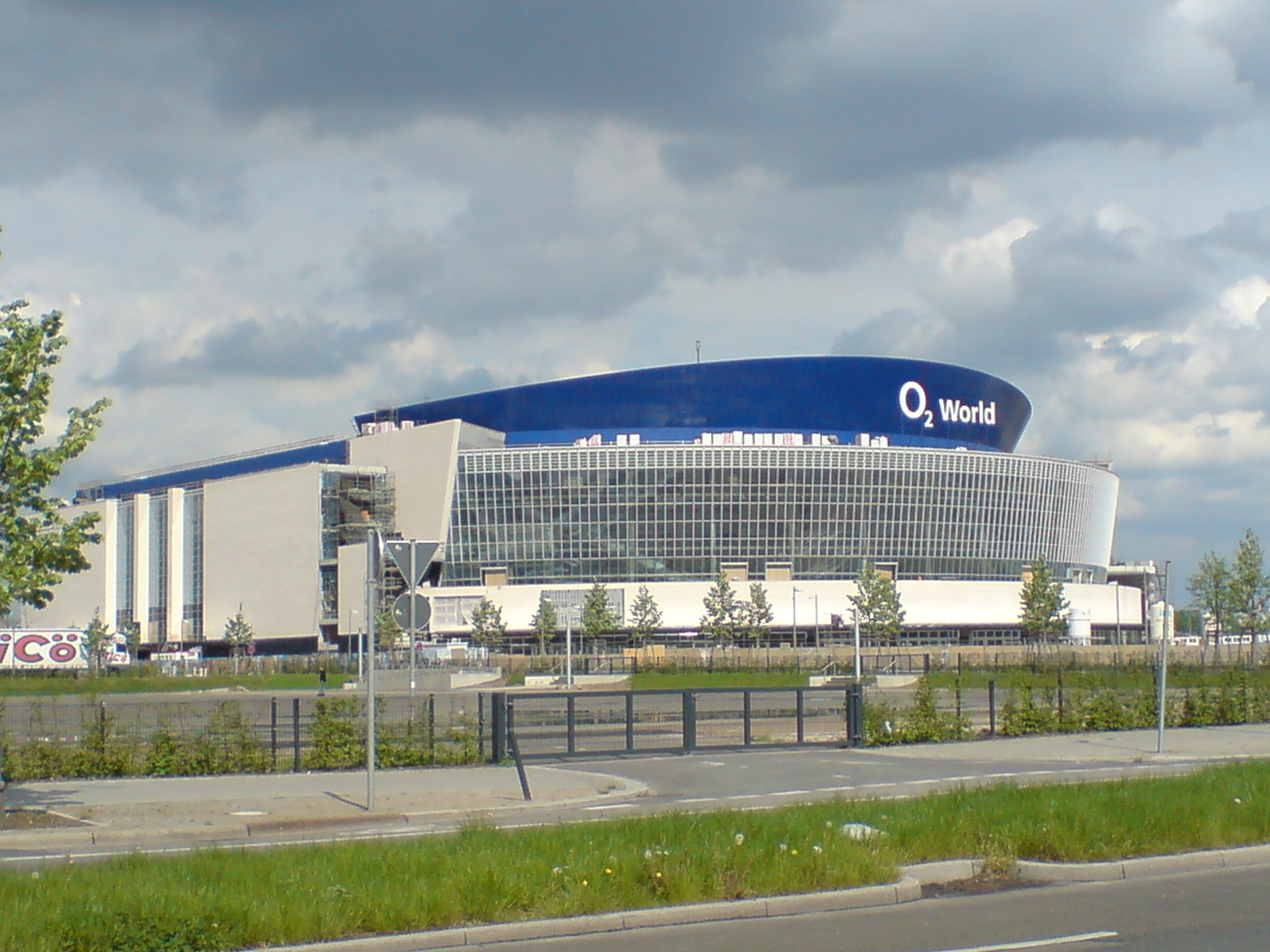 Berlin-Friedrichshain, Germany. O2 World under construction. View from Mühlenstraße.